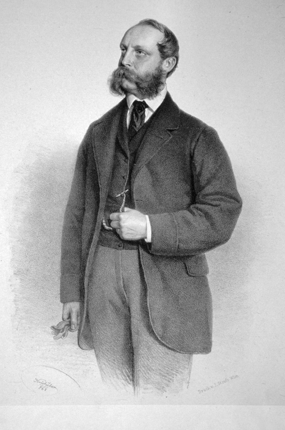 Rudolf von Chotek (1832-1894), Graf von Chotkowa und Wognin, k. k. Kämmerer, Erblandtürhüter, Mitglied des Herrenhauses. Lithographie von Josef Kriehuber, 1868